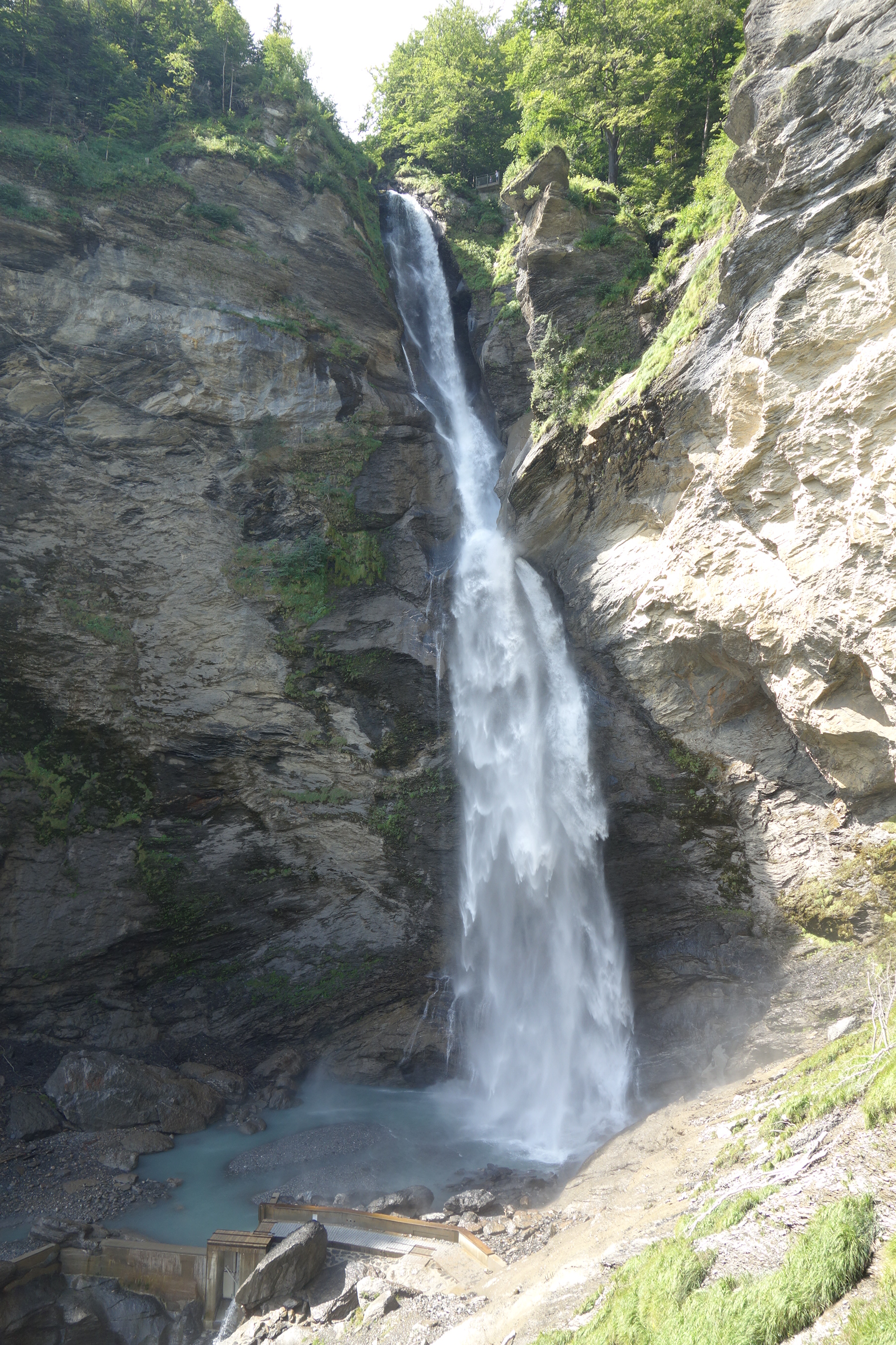 Kraftwerk Schattenhalb, Schattenhalb BE, Schweiz